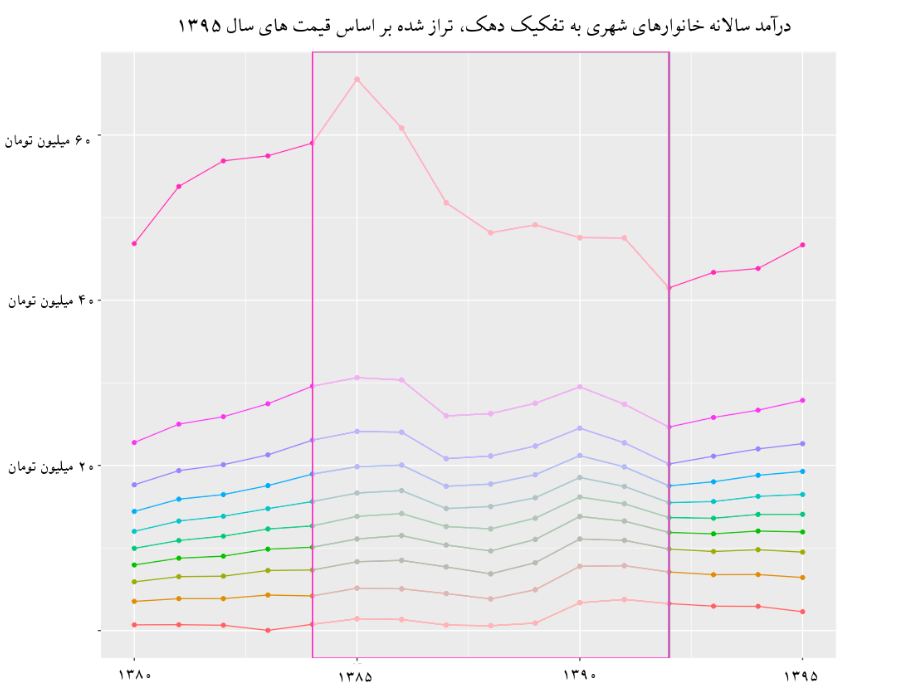 روند درآمد سالانه خانوارهای شهری ایرانی به تفکیک دهک از سال ۱۳۸۰ تا ۱۳۹۵، تراز شده بر اساس قیمت‌های سال ۱۳۹۵(داده‌های درآمدی از سایت مرکز آمار ایران، داده‌های مربوط به شاخص قیمت از سایت بانک مرکزی) (جهت نمایش عملکرد اقتصادی دولت محمود احمدی‌نژاد، این دوره هشت‌ساله با جعبه مشخص شده است)